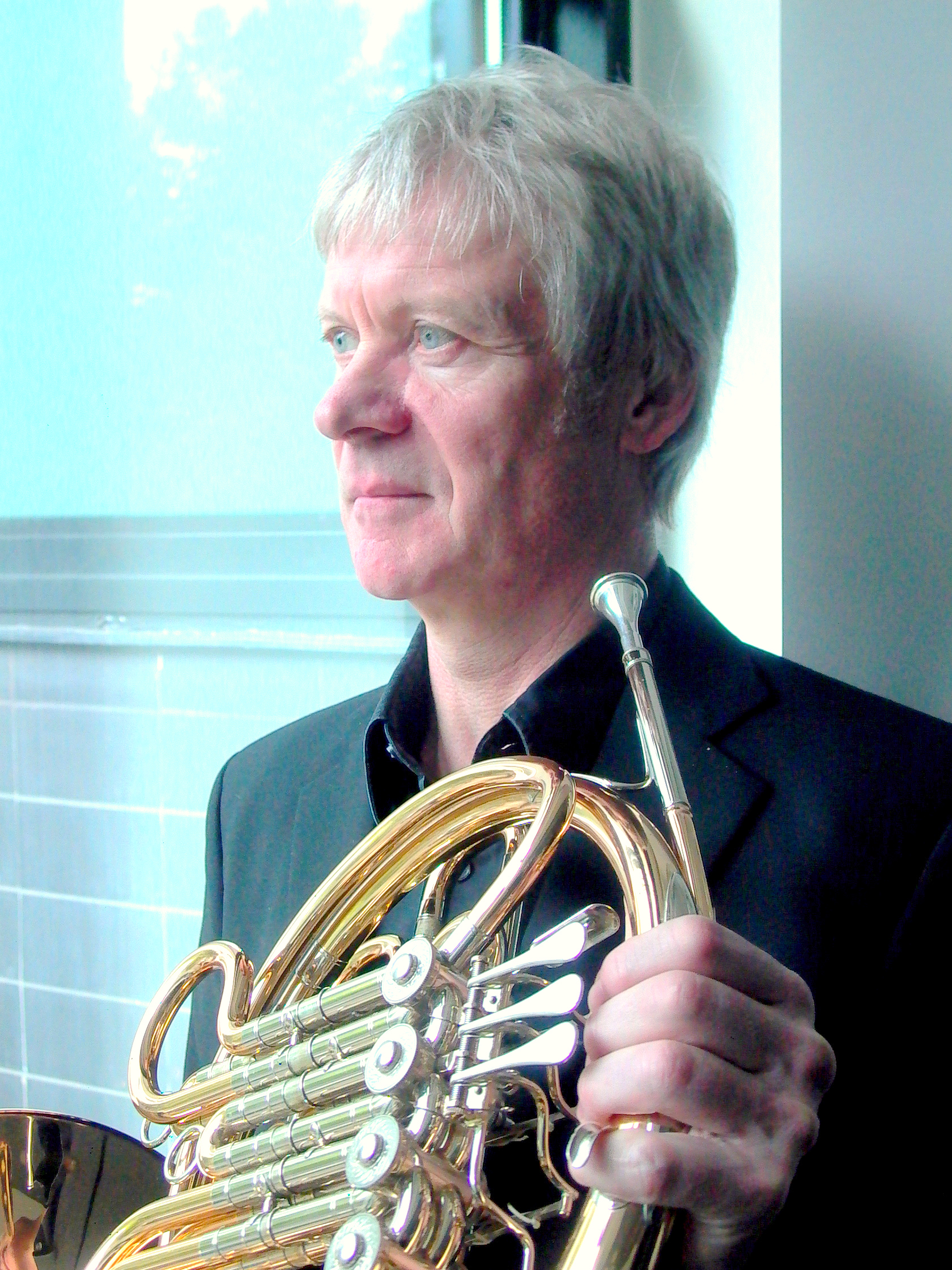 Künstlerporträt entstanden im MIR Gelsenkirchen